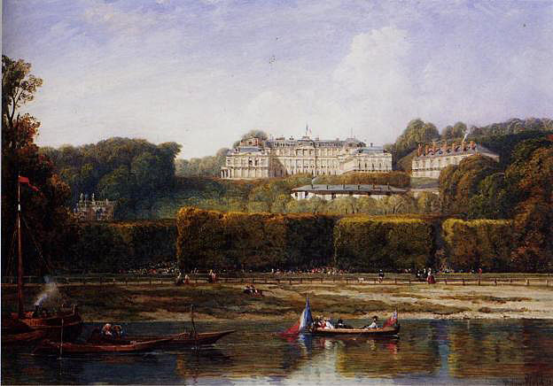 Le chateau de saint-Cloud en 1855title QS:P1476,fr:"Le chateau de saint-Cloud en 1855" label QS:Lfr,"Le chateau de saint-Cloud en 1855"